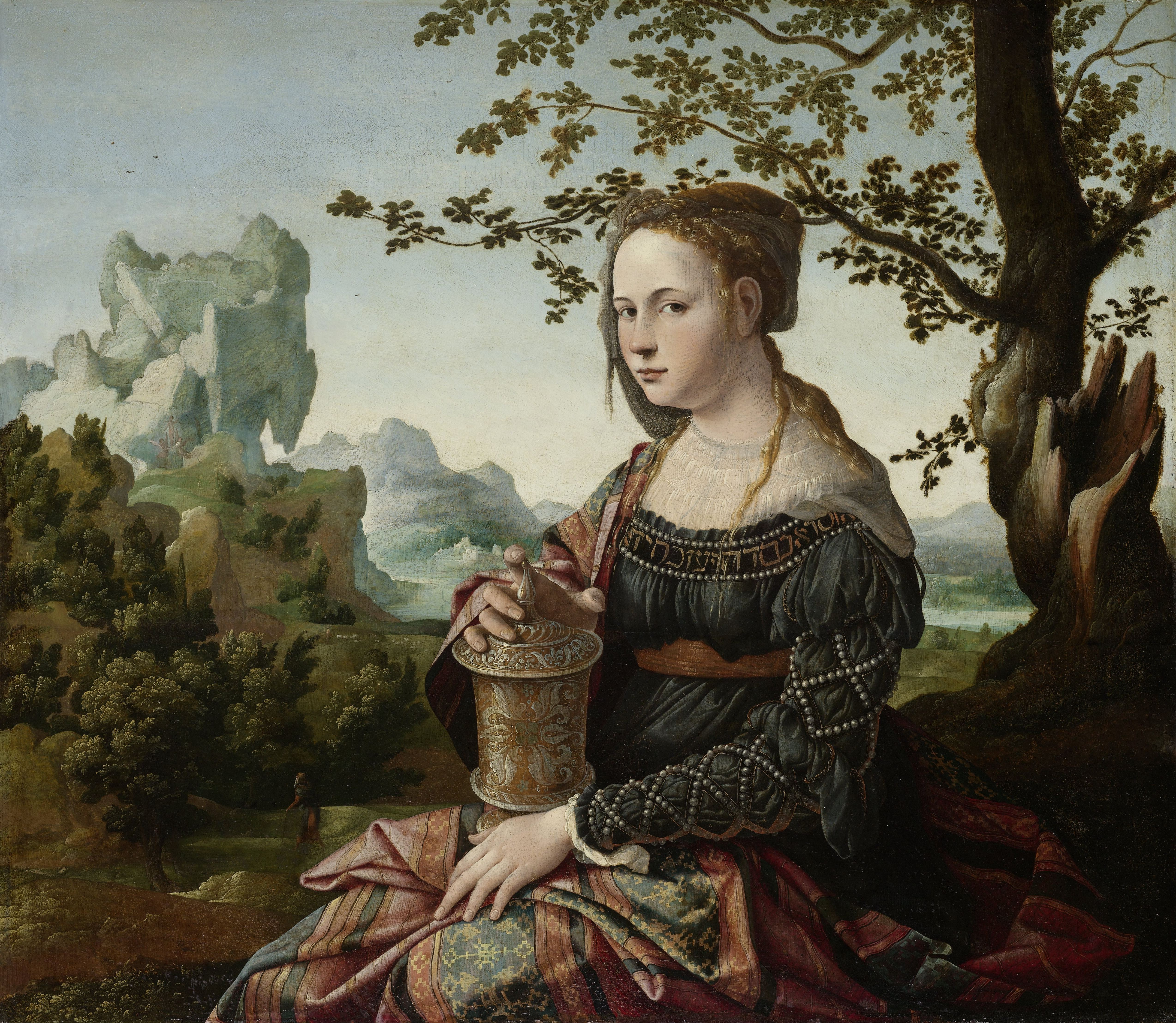 Tradition der niederländischen Romanisten.